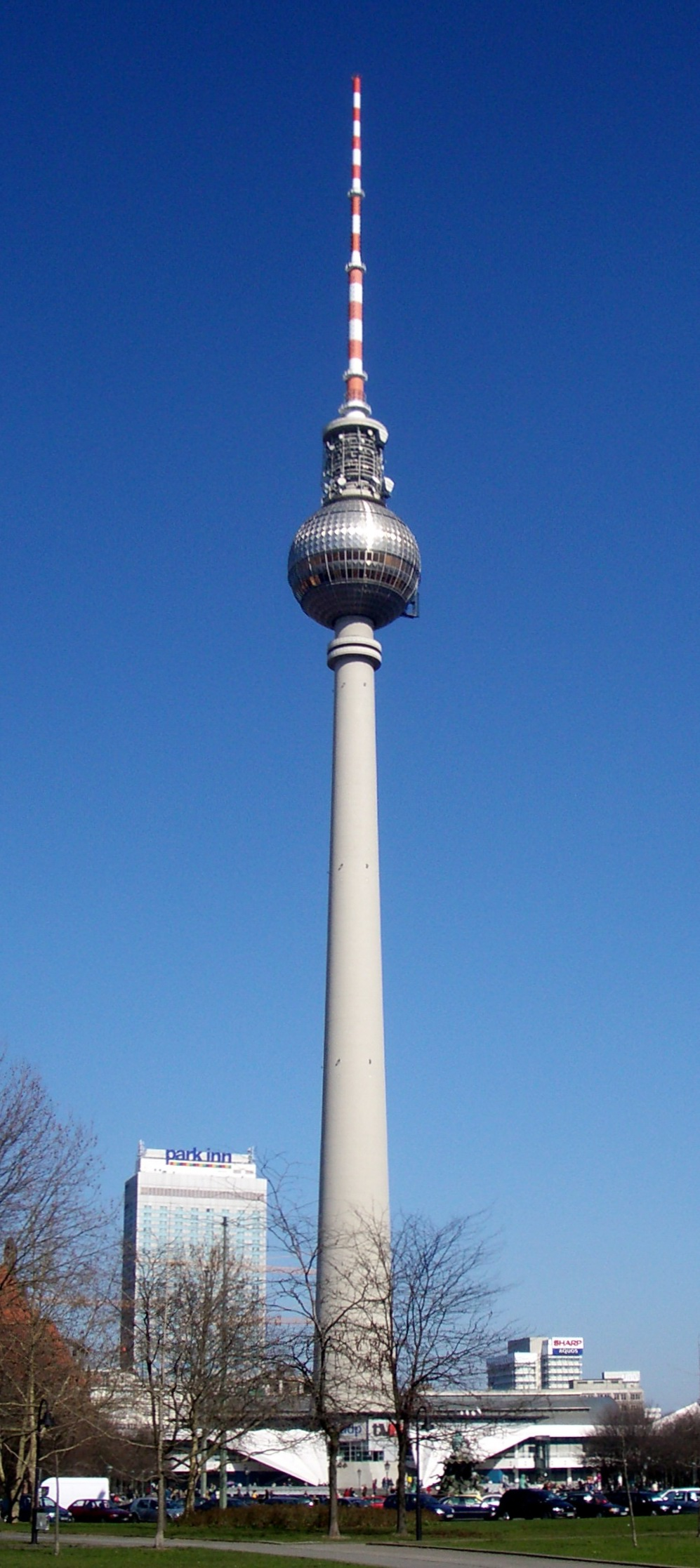 Berlin, Germany: Fernsehturm